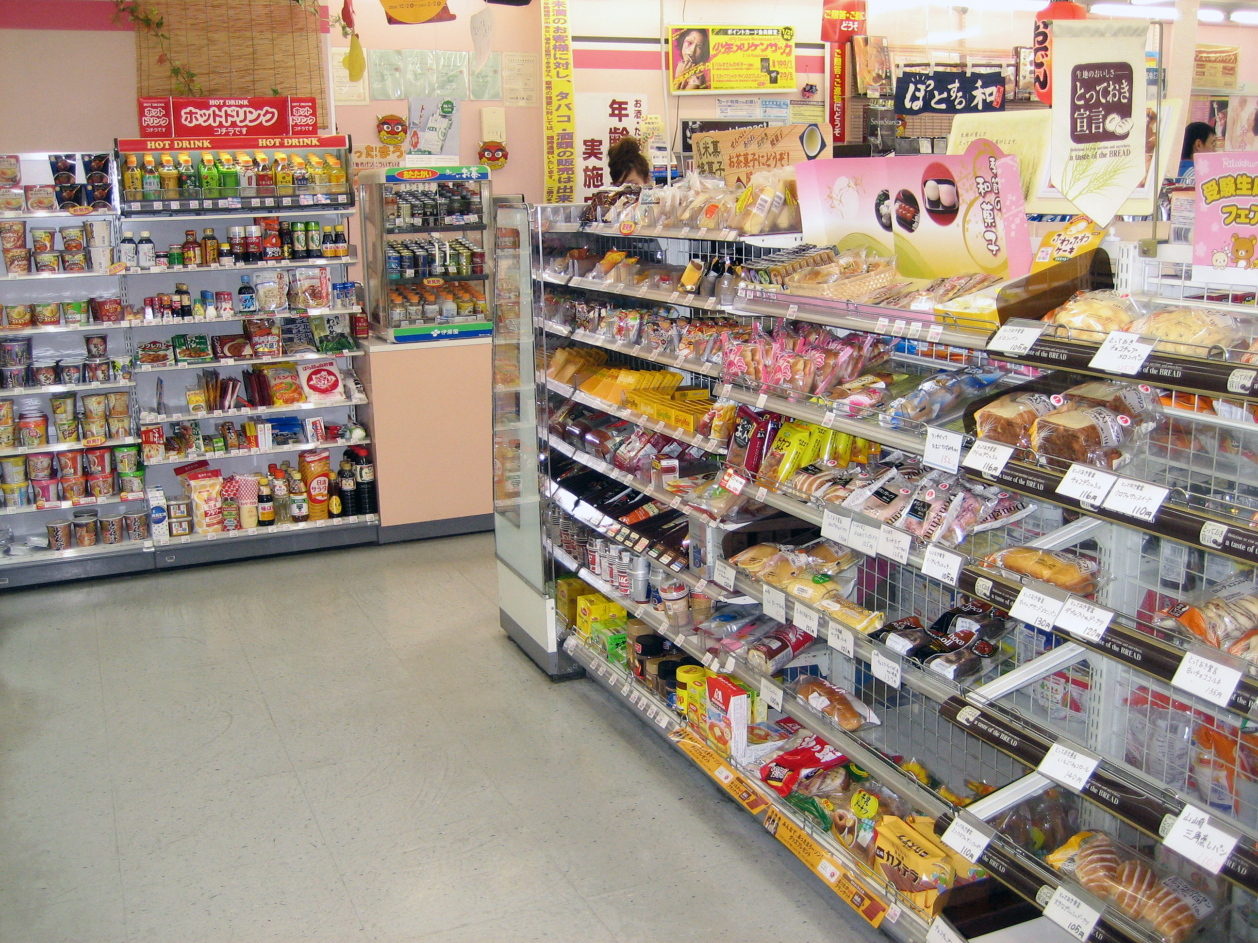 日本のコンビニエンスストアチェーンのローソンの店内。